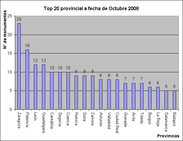 Top 20 de provincias en la Lista Roja con monumentos en peligro a fecha de Octubre 2008